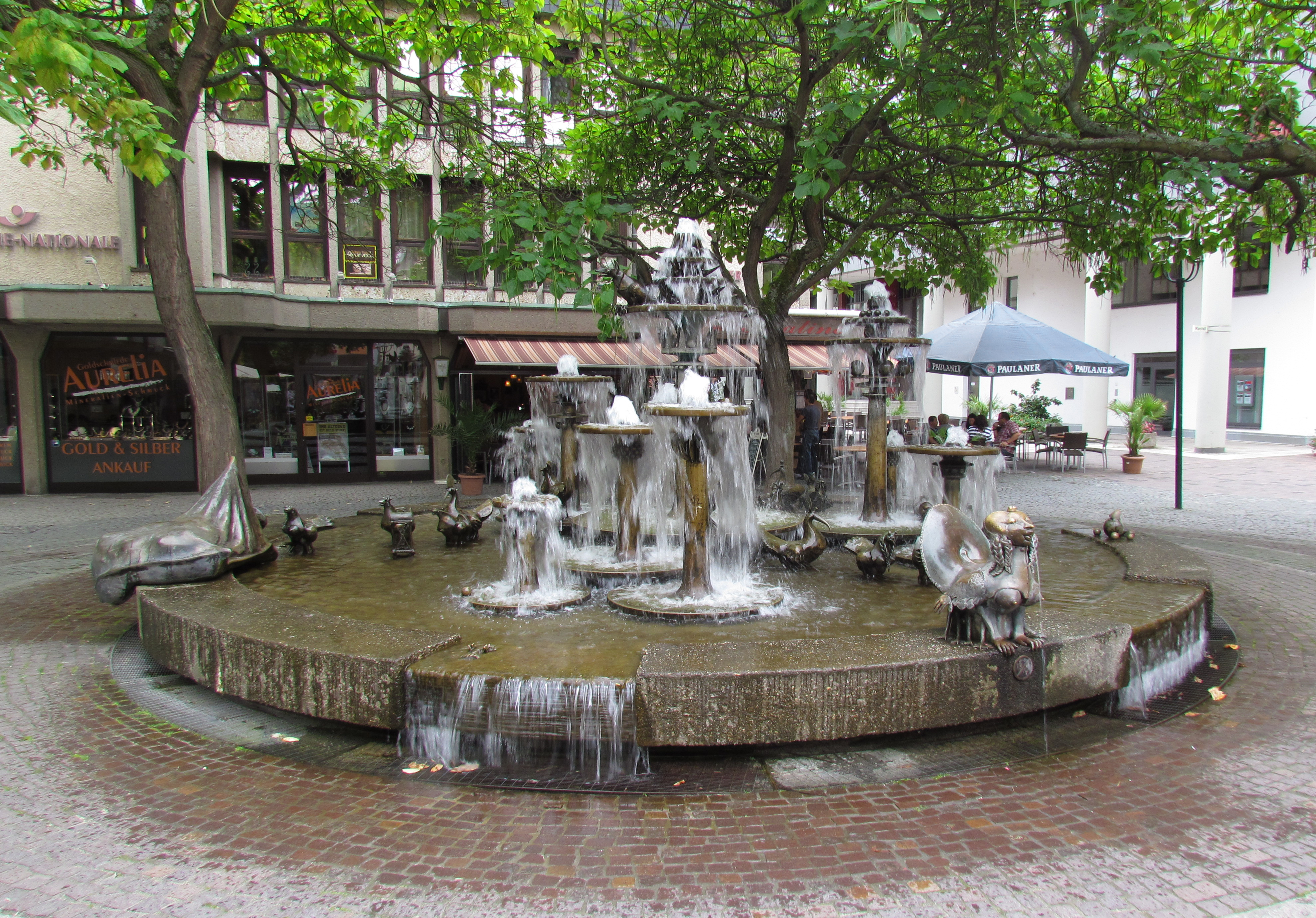 Bildinhalt: Elwedritsche-Brunnen Aufnahmeort: Neustadt an der Weinstraße, Deutschland